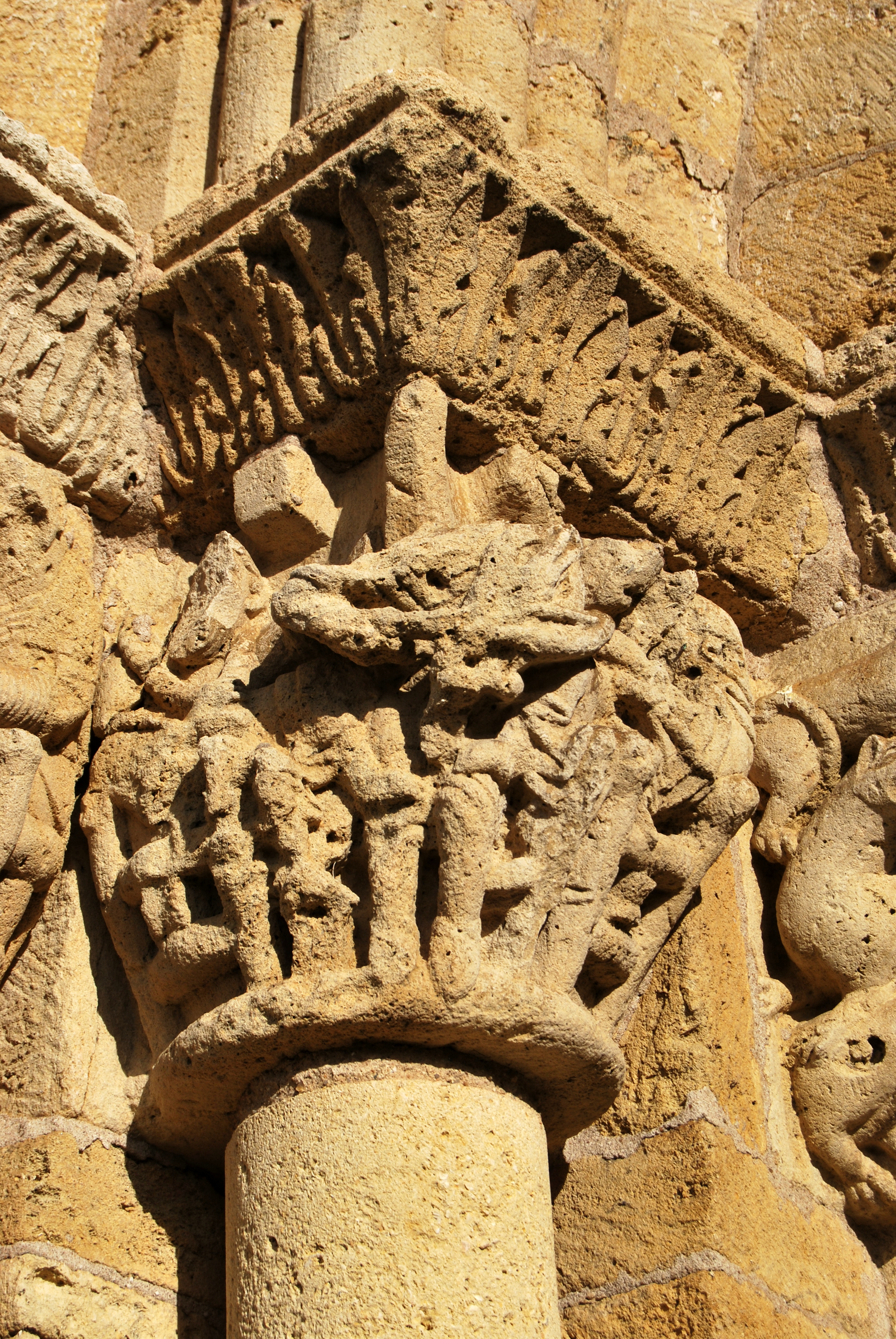 Église Saint-Vincent (Saint-Vincent-de-Pertignas)